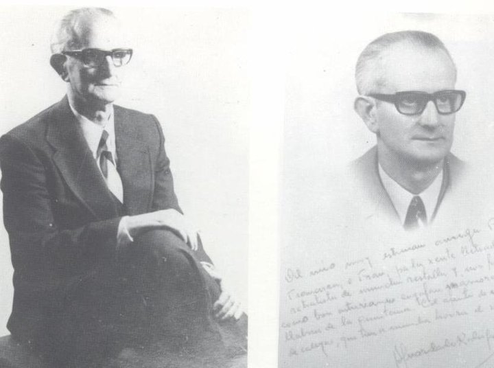 Retrato del escritor Bernardo Guardado